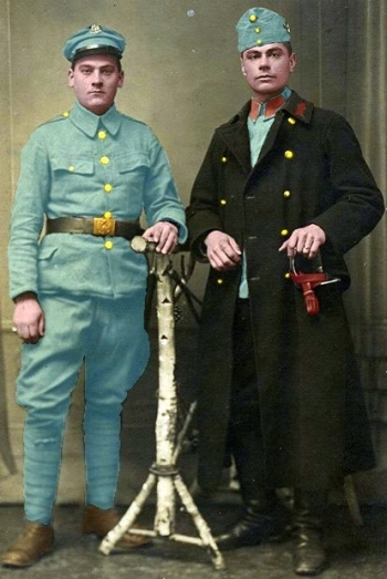 Der k. u. k. Soldat vom Infanterie-Regiment Nr. 45 (rechts) steht zusammen mit dem polnischen Legionär